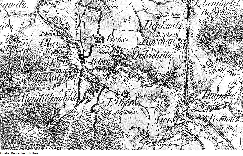 Original image description from the Deutsche Fotothek Obergurig-Kleindöbschütz. Oberreit, Sect. Stolpen, 1821/22